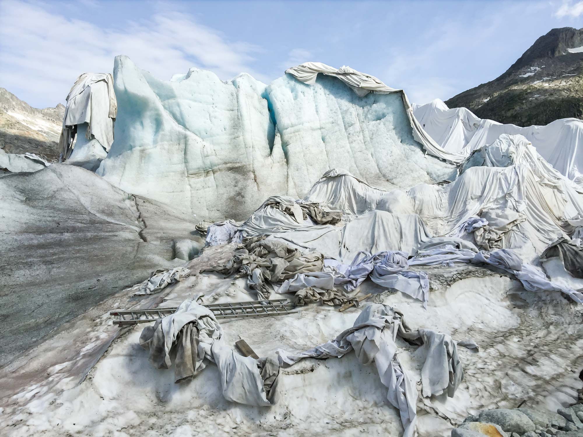 Glaciers #001, Rhonegletscher, 2015, tirage papier Photo Rag Hahnemühle, 60 x 80 cm Glaciers #001, Rhonegletscher, 2015, Rag Paper print Hahnemühle, 24 x 32’’, 60 x 80CM